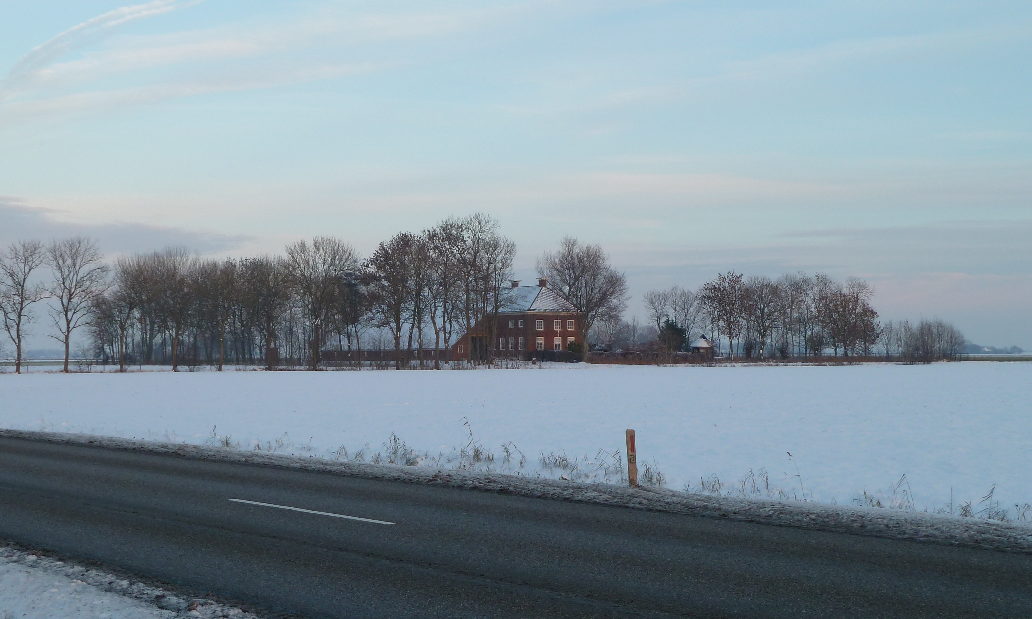 Boerderij De Pol in de Oude Ruigezandsterpolder nabij Lauwerzijl in de Nederlandse provincie Groningen.